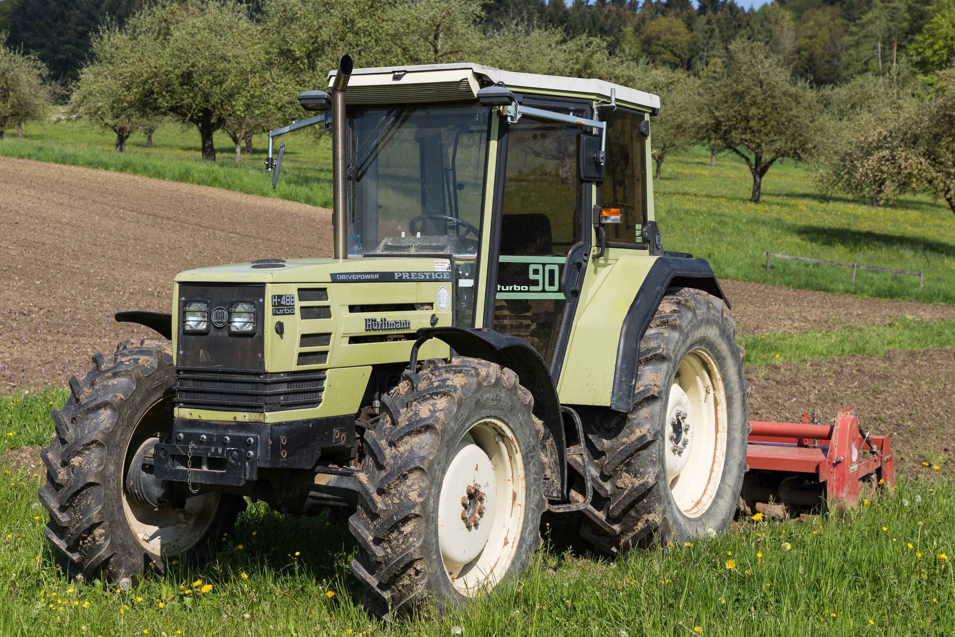 Hürlimann H-488 Turbo im Thurgau